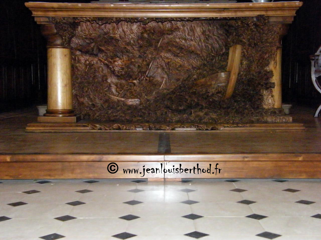 Autel de l'Eglise d'Albens (Savoie, France), sculpté par Jean-Louis Berthod, habitant de la commune.